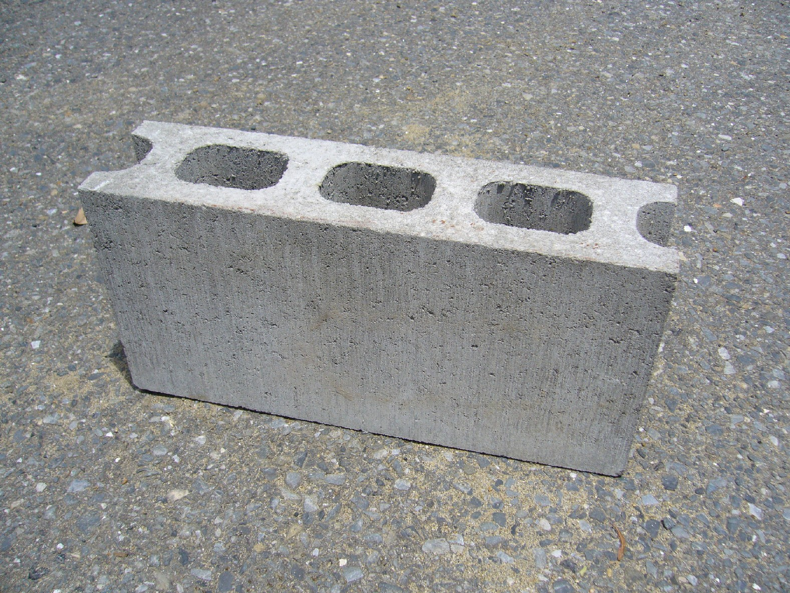 concrete-block,japan